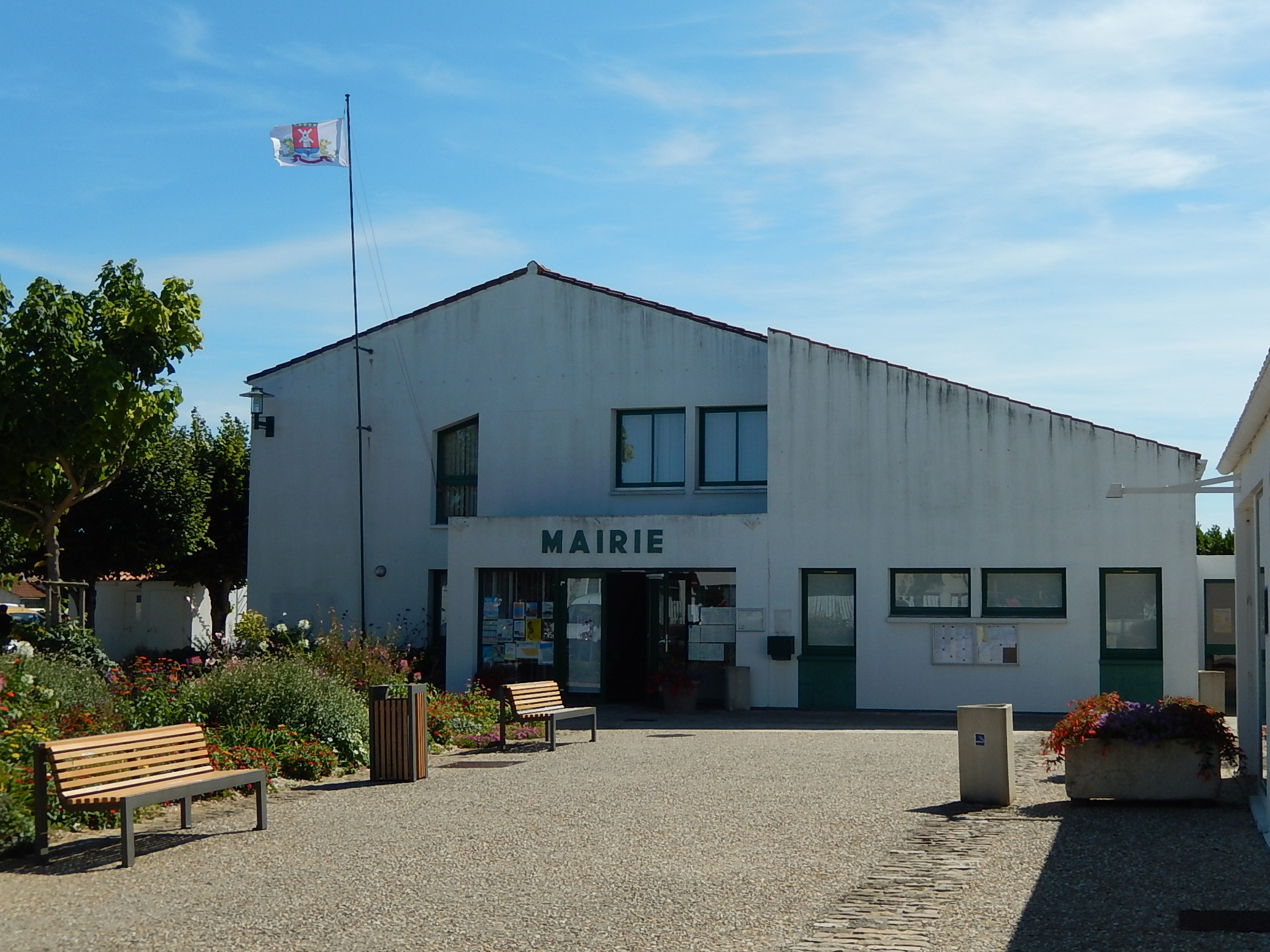 La mairie de La-Brée-Les-Bains, commune française de Charente-Maritime.